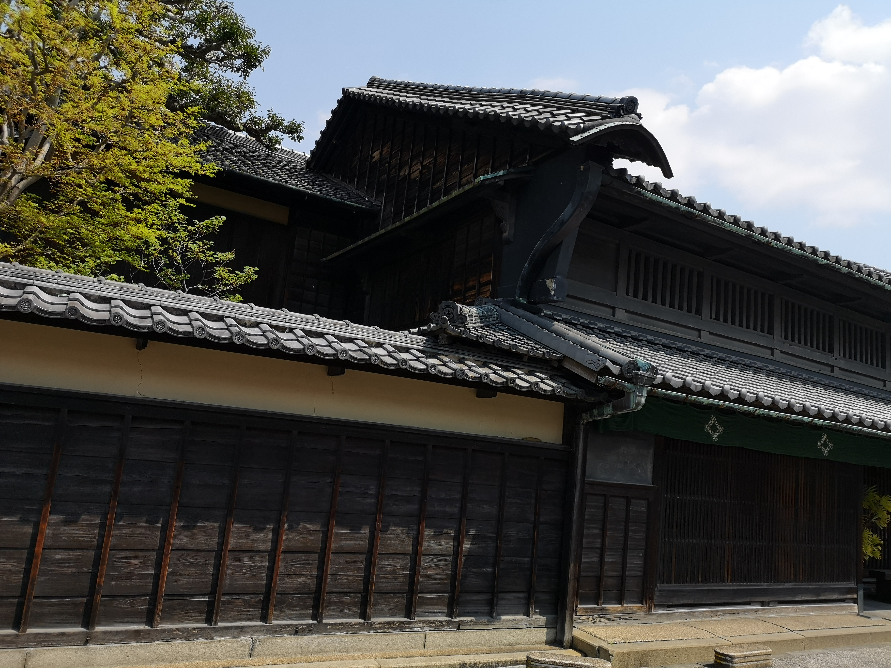 有松にあるうだつのある民家